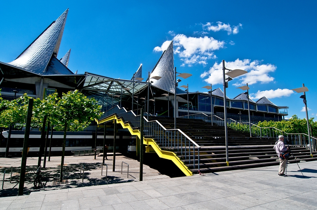 Justitiepaleis Antwerpen 2